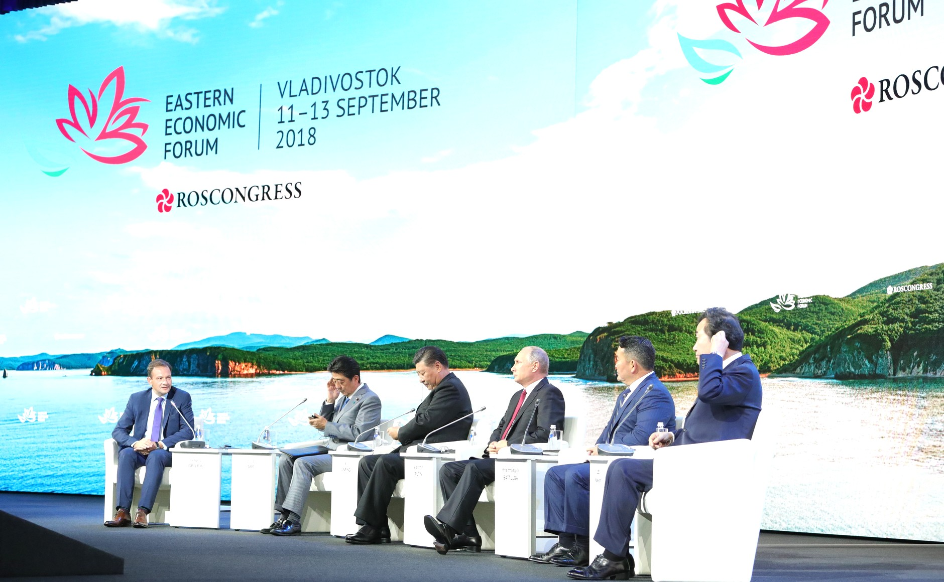 На пленарном заседании Восточного экономического форума.